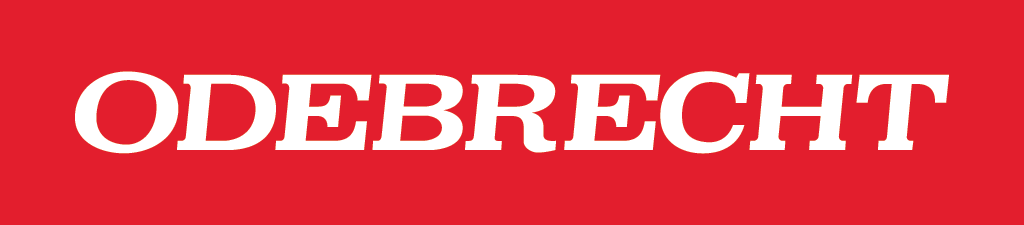 Odebrecht es una organización global de origen brasileño dedicada a negocios diversificados en Ingeniería y Construcción, Industria e Infraestructura y Energía